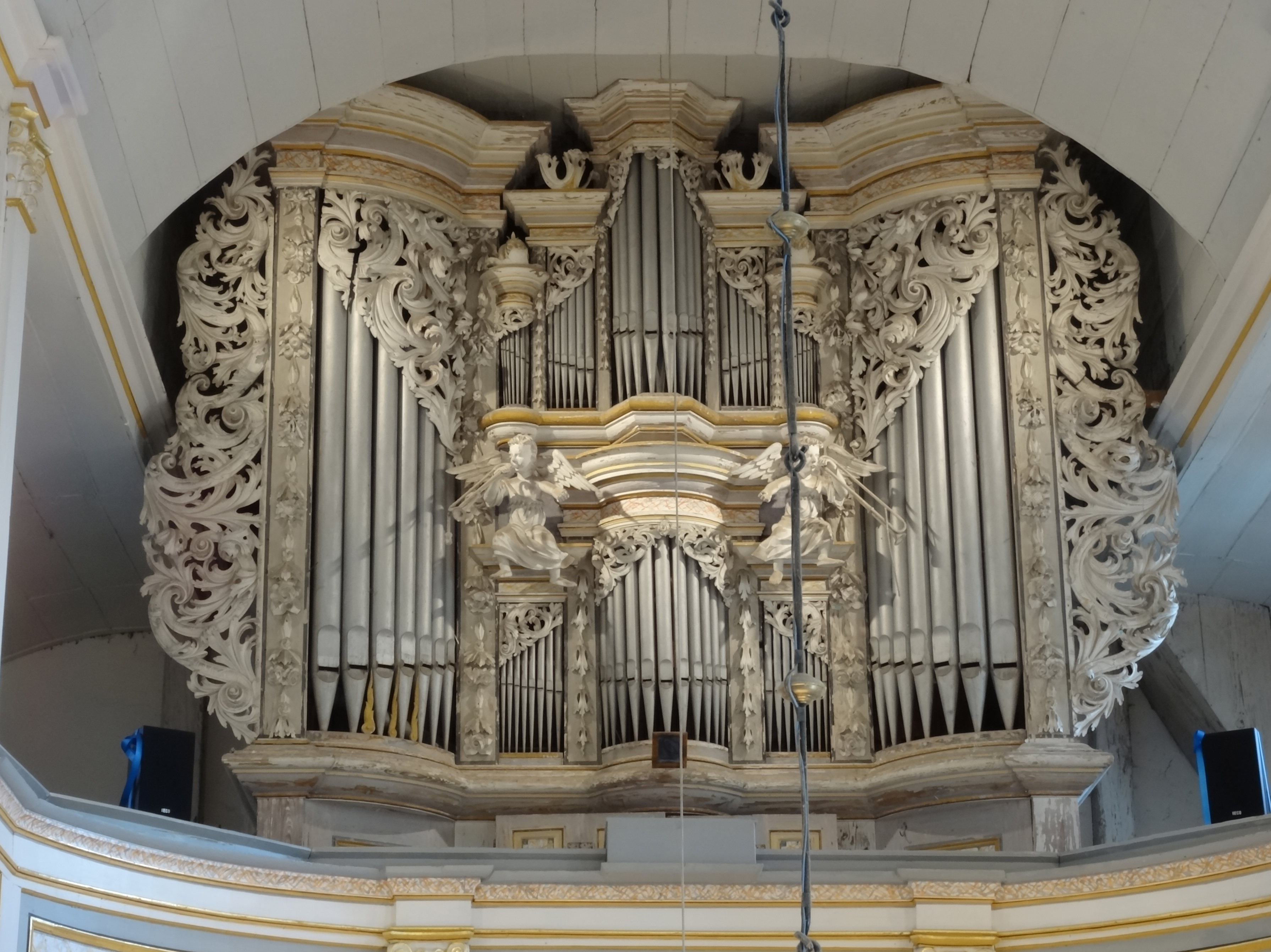 1731 vom Erfurter Orgelbauer Johann Georg Schröter erbaute Orgel der Kirche Zur Himmelspforte in Niedernissa